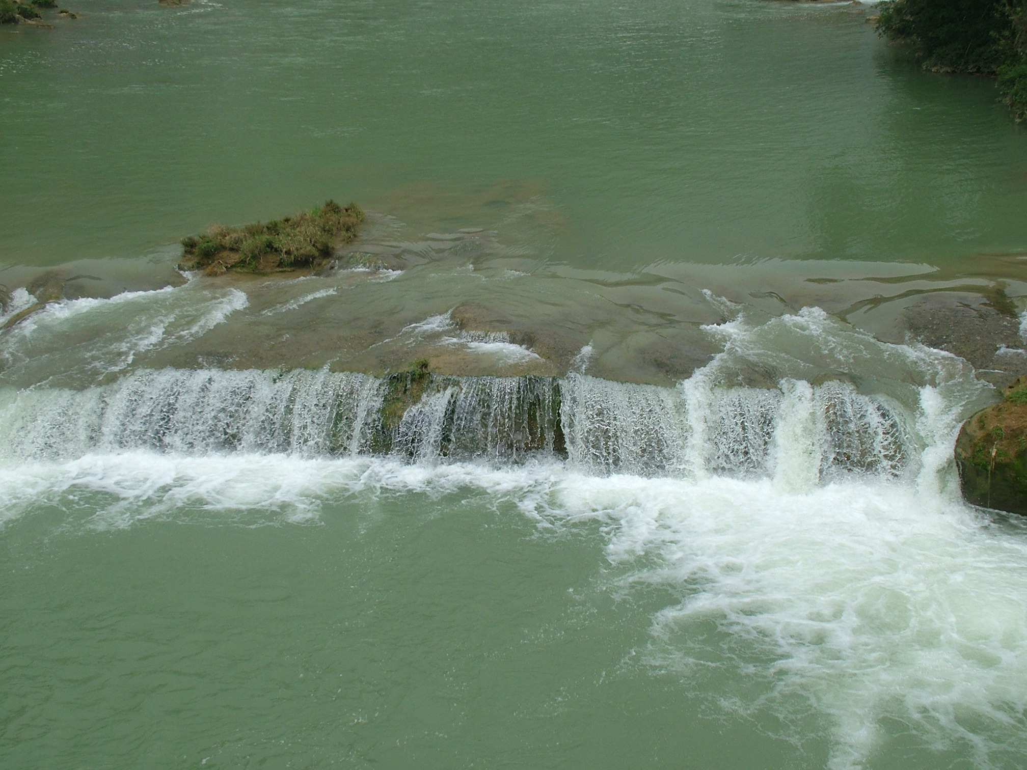 黄果树瀑布的犀牛潭